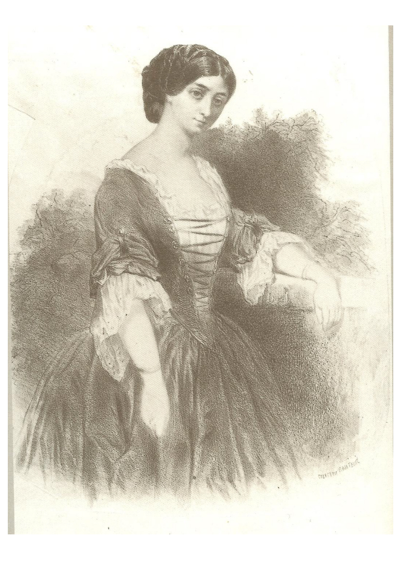 La cantatrice Bosio lors de la première de Luisa Miller à Paris en 1853